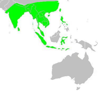 areale della specie